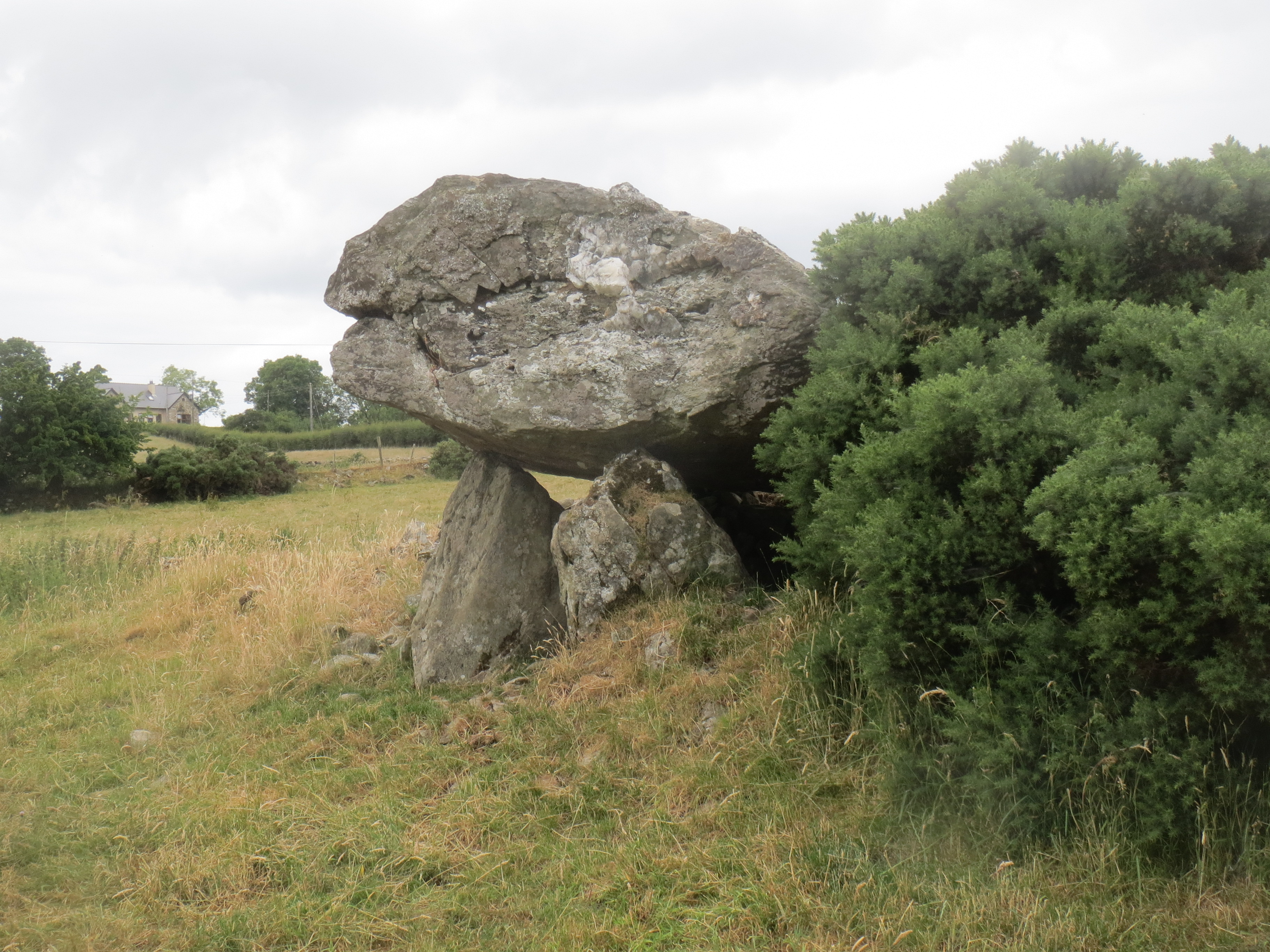 Leitrim Portal Tomb